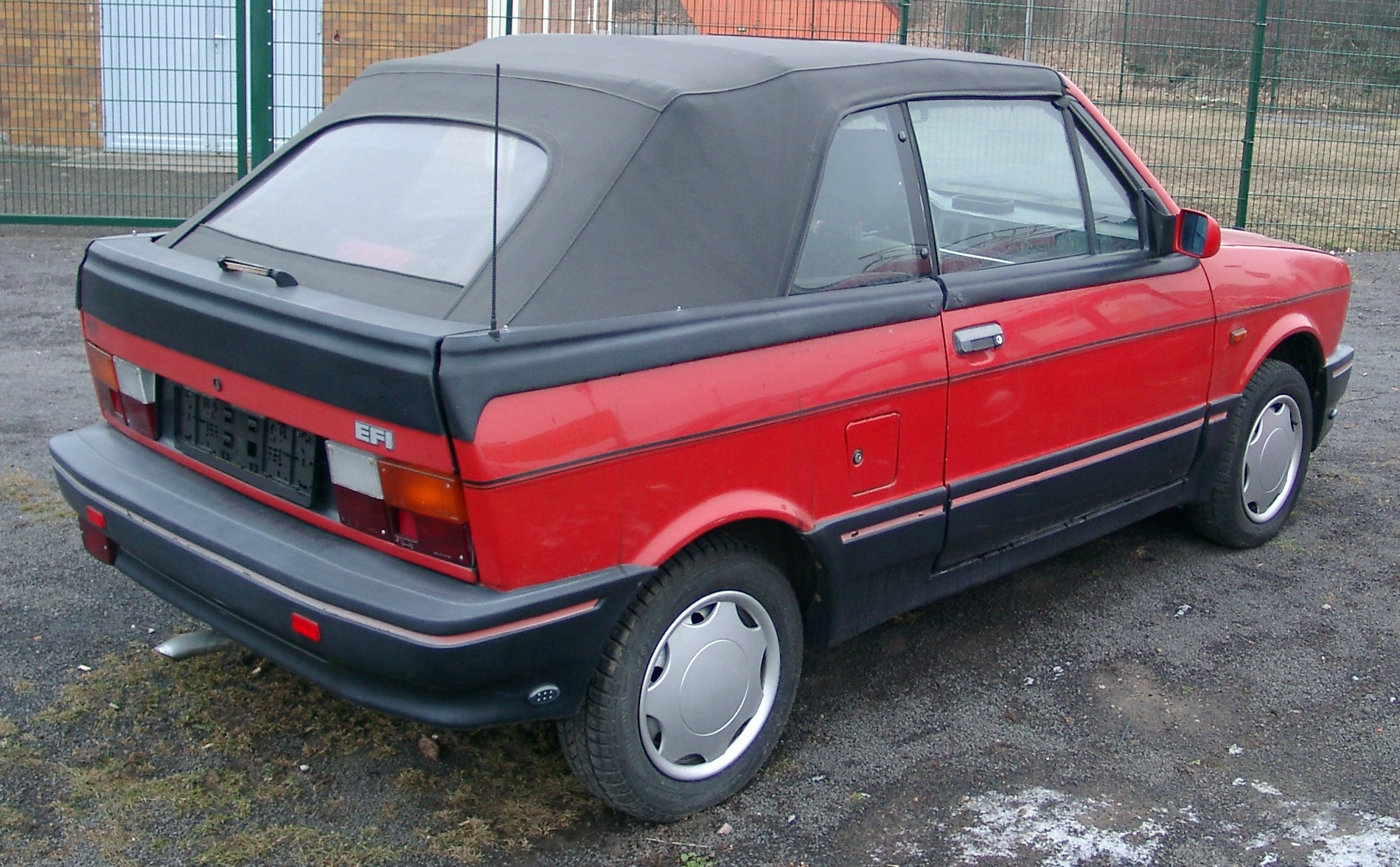 Yugo Cabrio 65 EFI